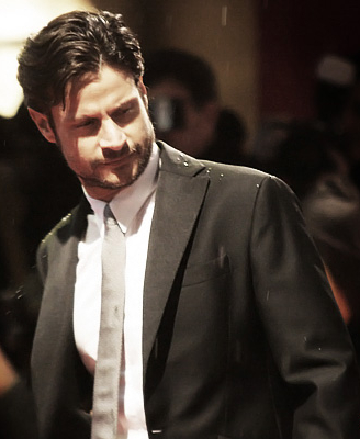 Actor Andrea Sartoretti - Romanzo Criminale - Red Carpet